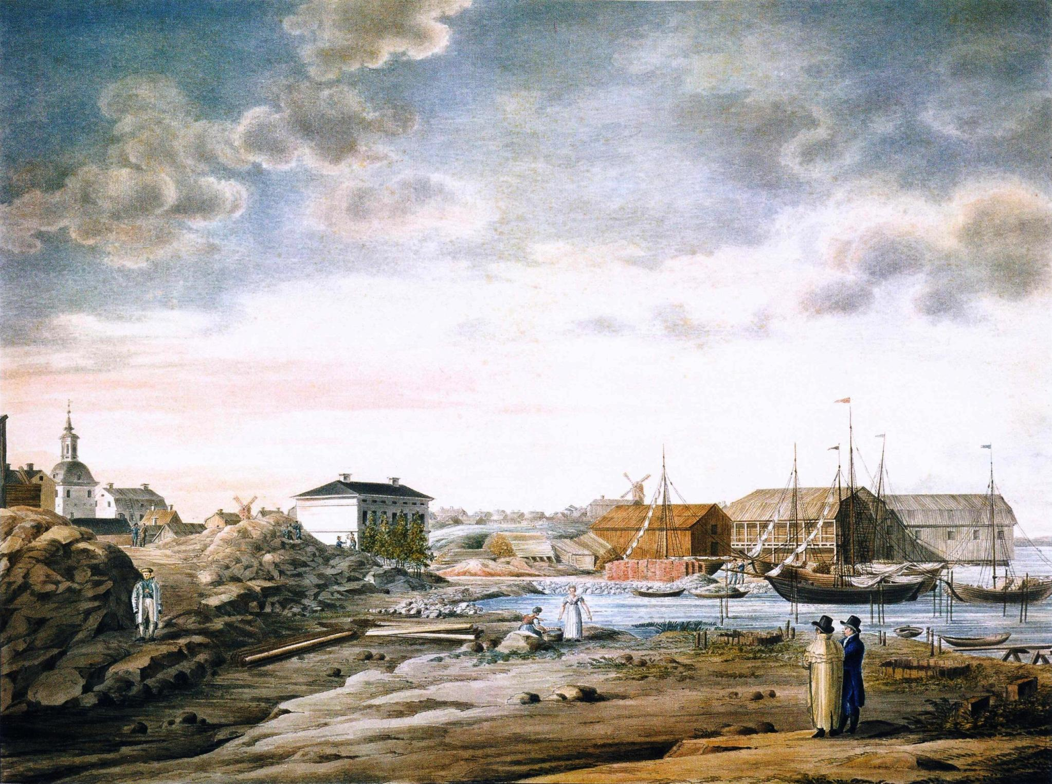 Carl Ludvig Engelin maalaus Helsingin Pohjoissatamasta Katajanokalta nähtynä. Vaalea rakennus kuvan keskellä on vanha tulli- ja pakkahuone, taustalla vasemmalla kirkon kellotapuli. Teoksen omistaa Helsingin kaupunginmuseo.